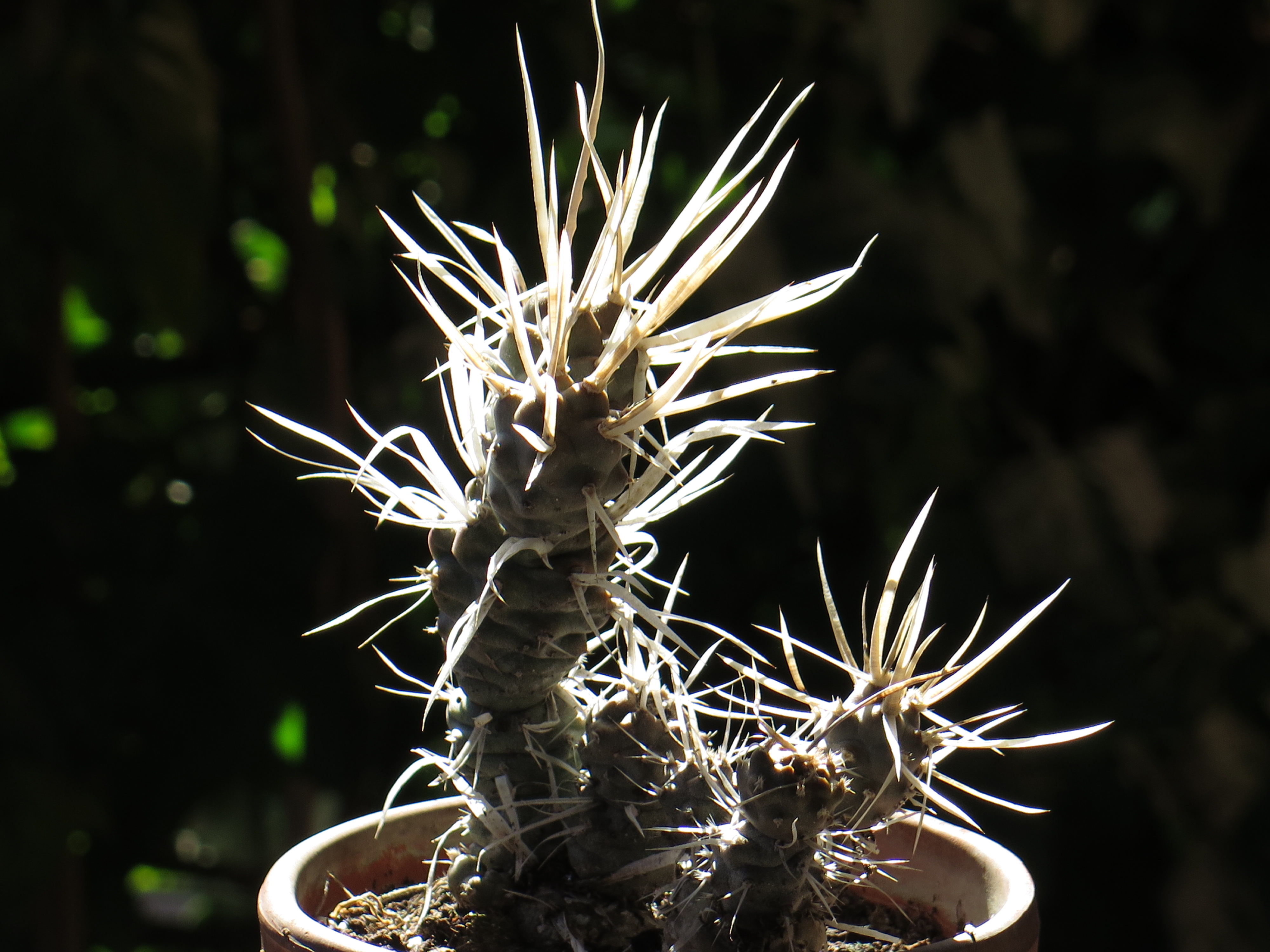 Tephrocactus articulatus (opuntia diademata)